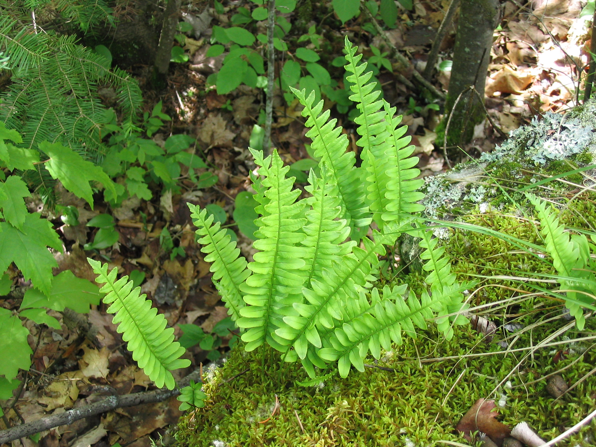 Polypodium virgnianum 2-eheep